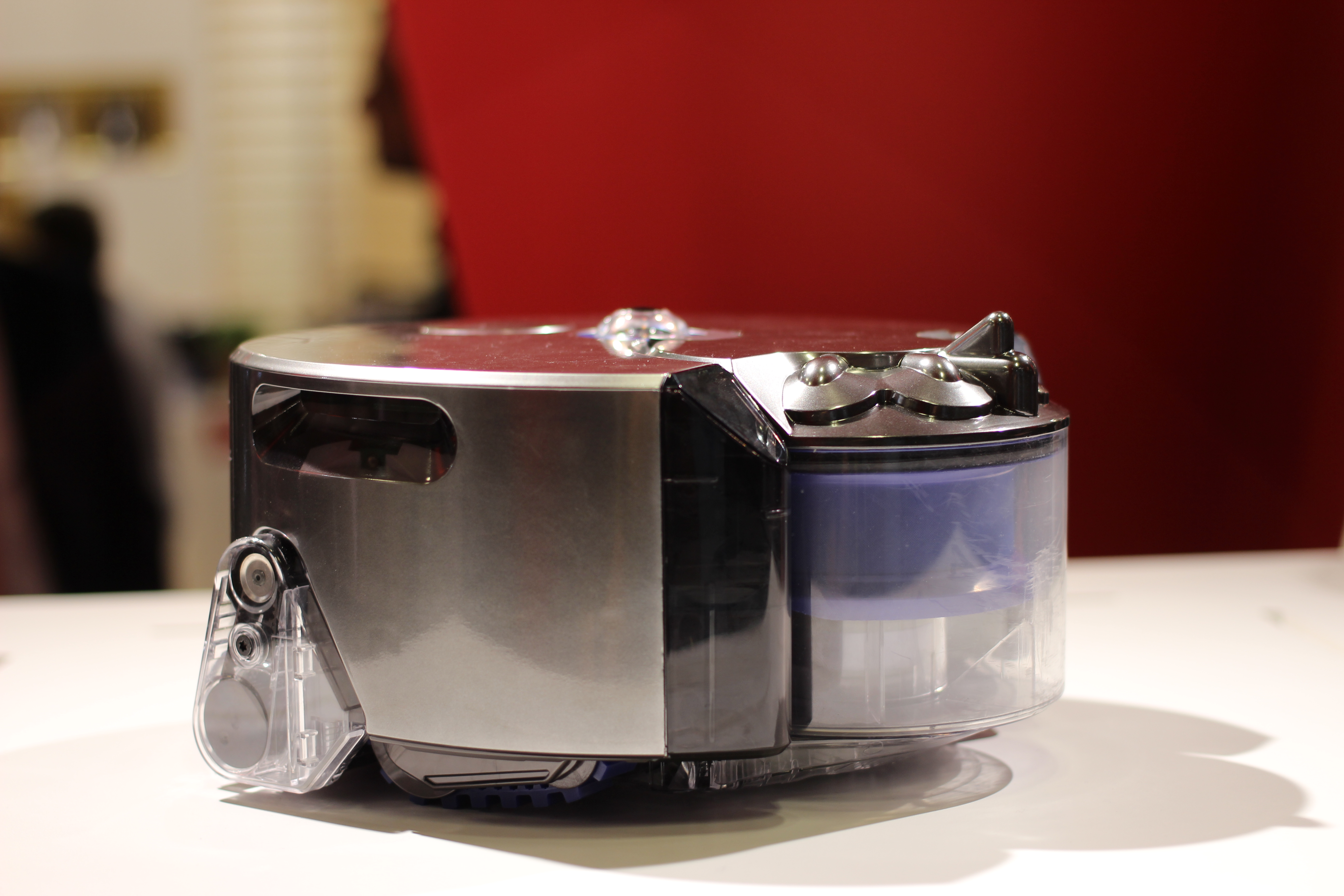 Dyson 360 Eye